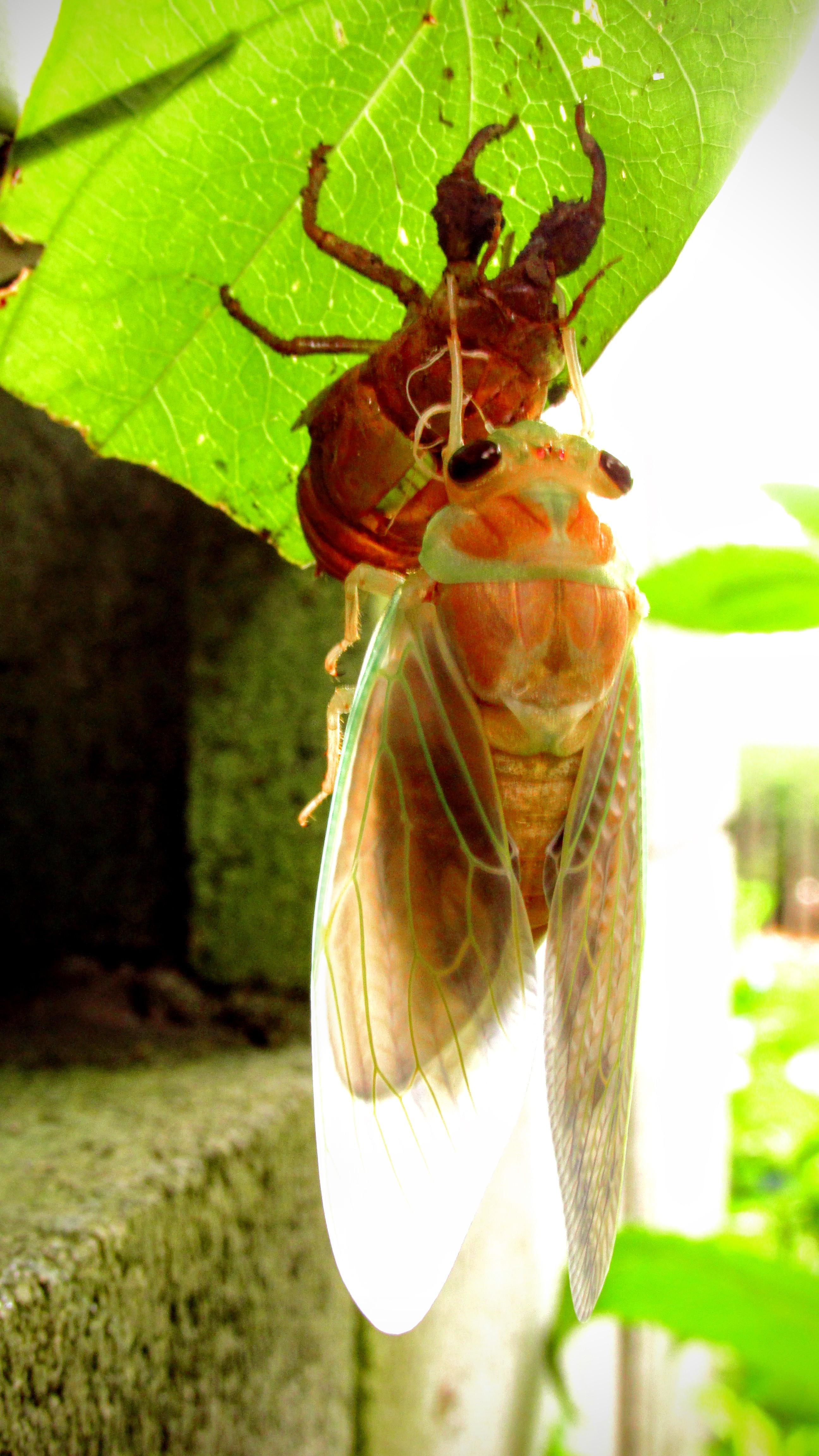 民家の庭木から羽化しているところ（埼玉県中西部）